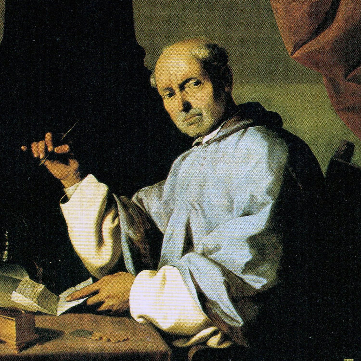 Retrato póstumo del prelado español Fray Gonzalo de Illescas († 1464), que llegó a ser obispo de Córdoba y prior del Real Monasterio de Santa María de Guadalupe.